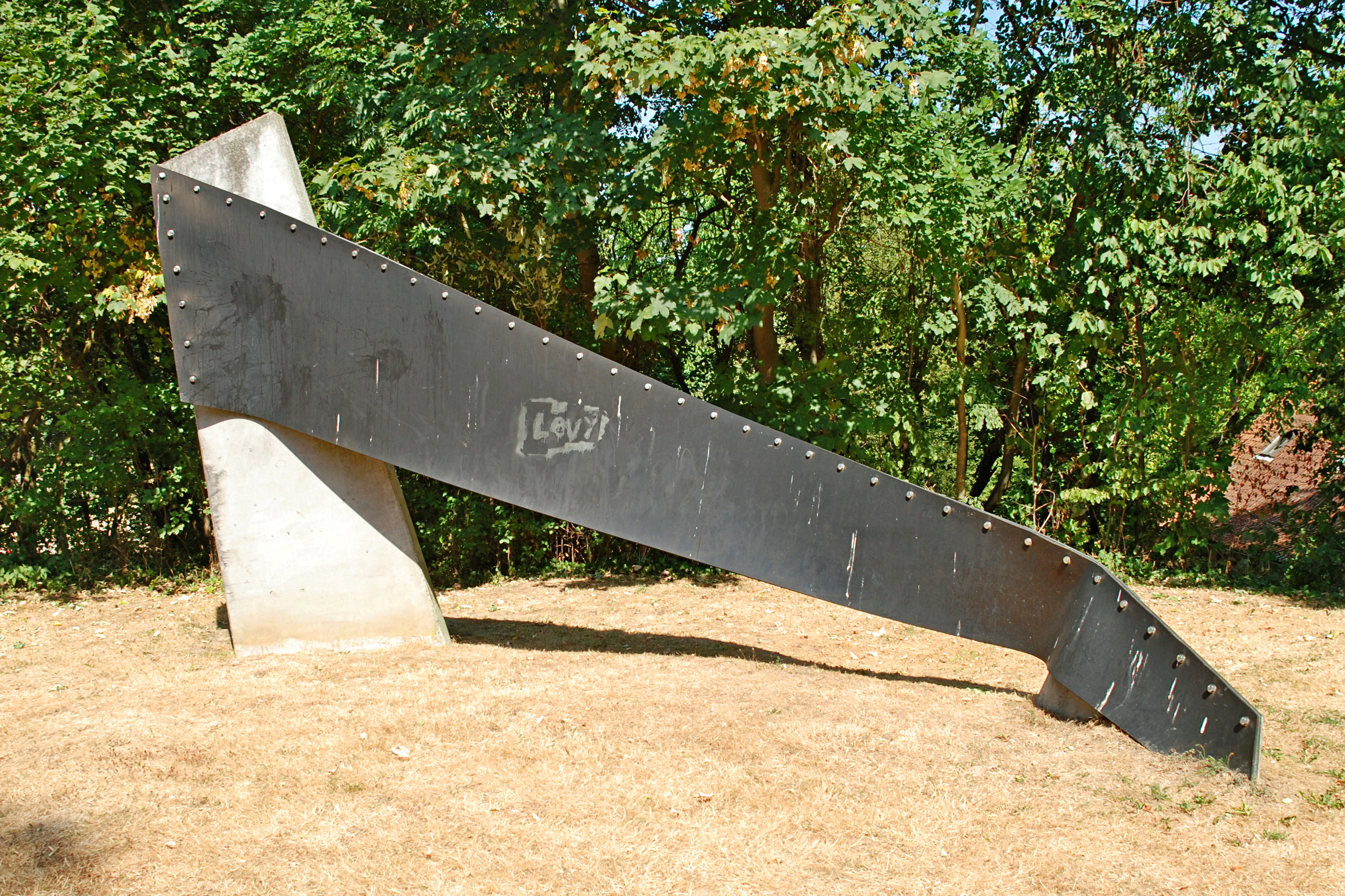 Belgique - Louvain-la-Neuve - rue P.J. Redouté - Niké ou Projection de forces (sculptrice Tapta 1988) This photo of immovable heritage has been taken in the Walloon Region